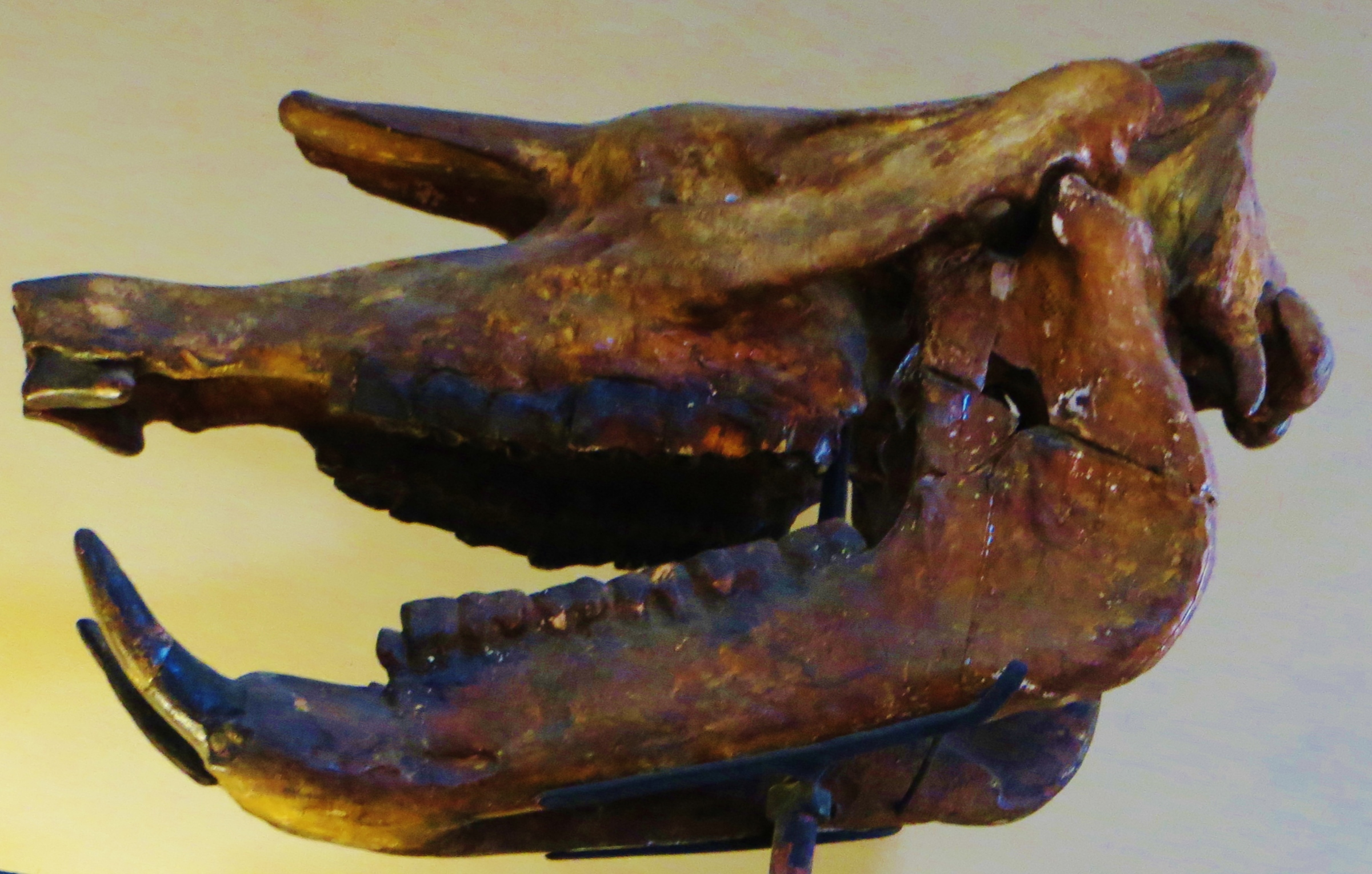 Fossil of Aceratherium, an extinct mammal - Took the photo at Museum Histoire Naturelle, Paris